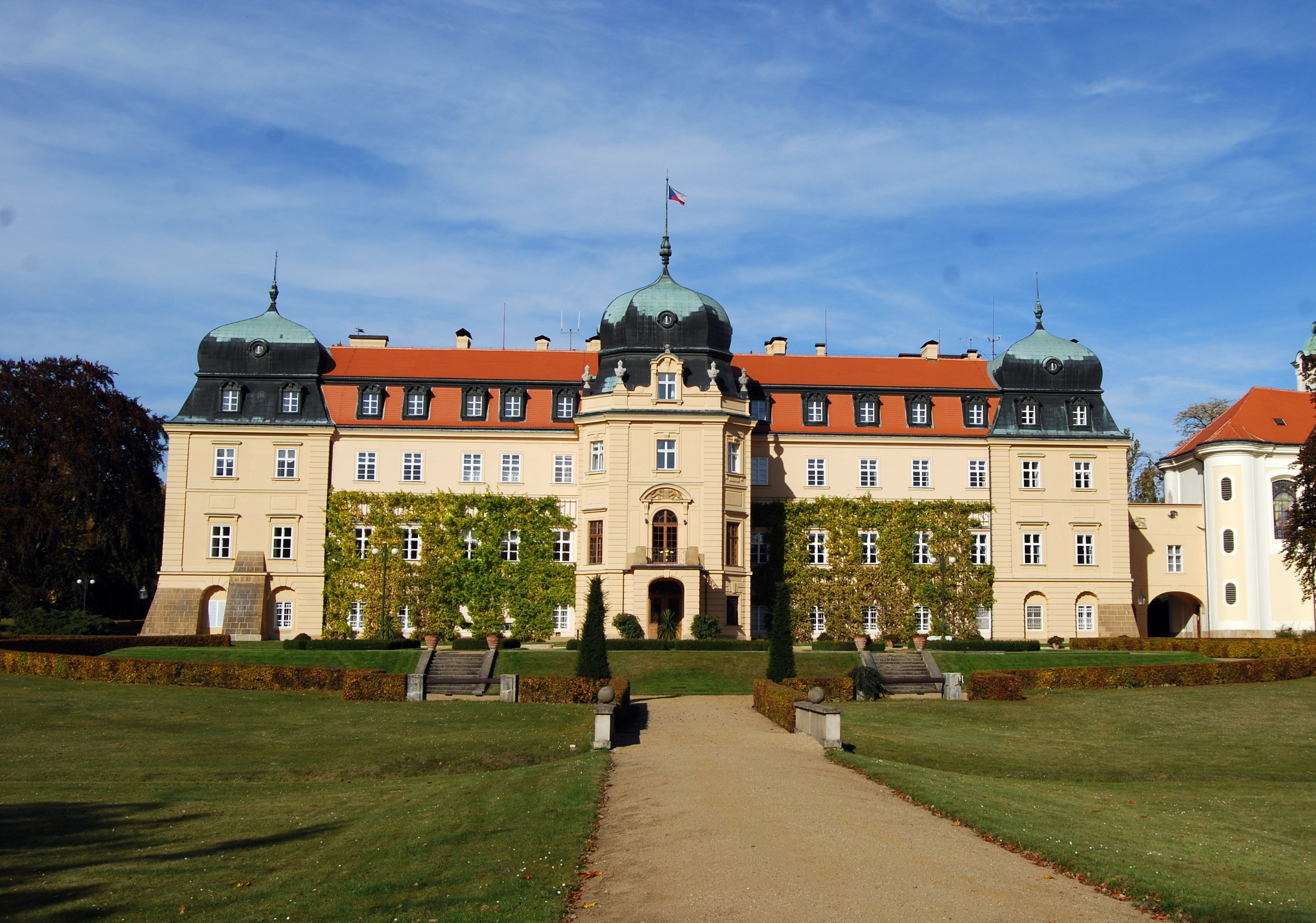 Zámek Lány - pohled od jihu ze zámeckého parku.